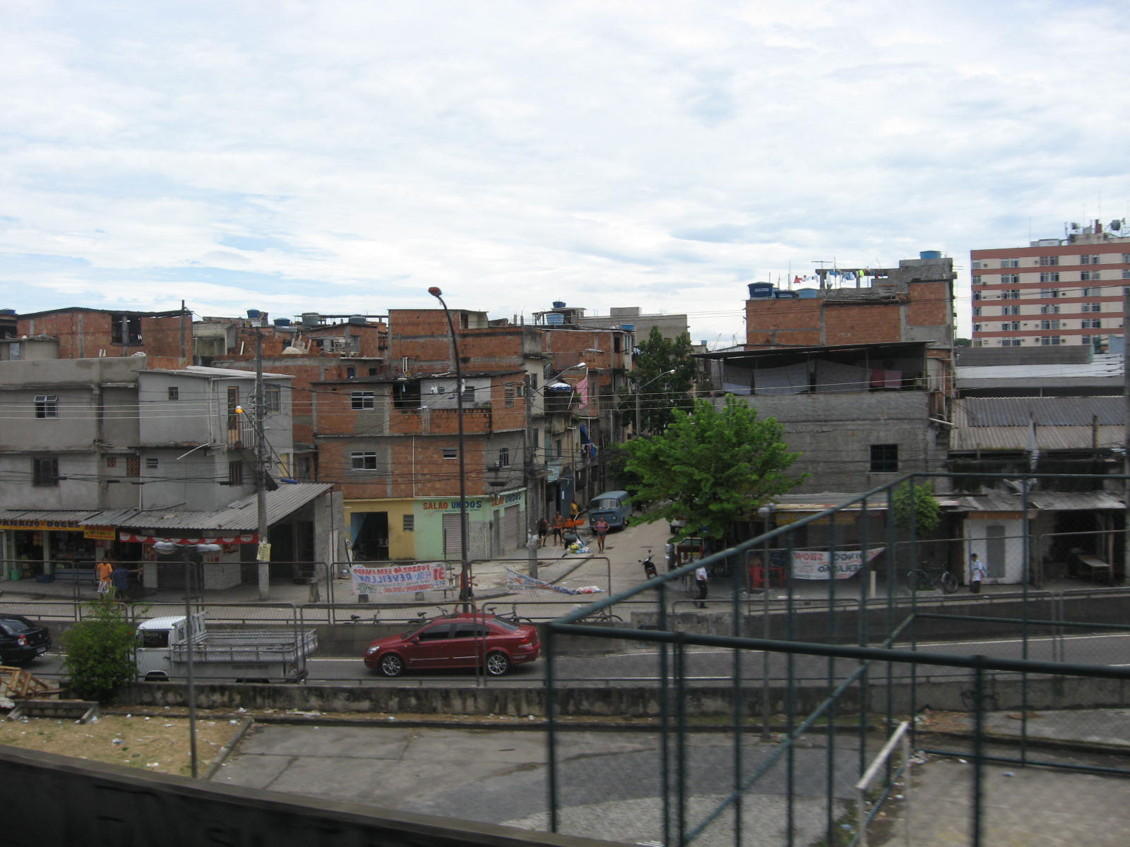 Favela de Manguinhos, localizada na cidade do Rio de Janeiro, Brasil.